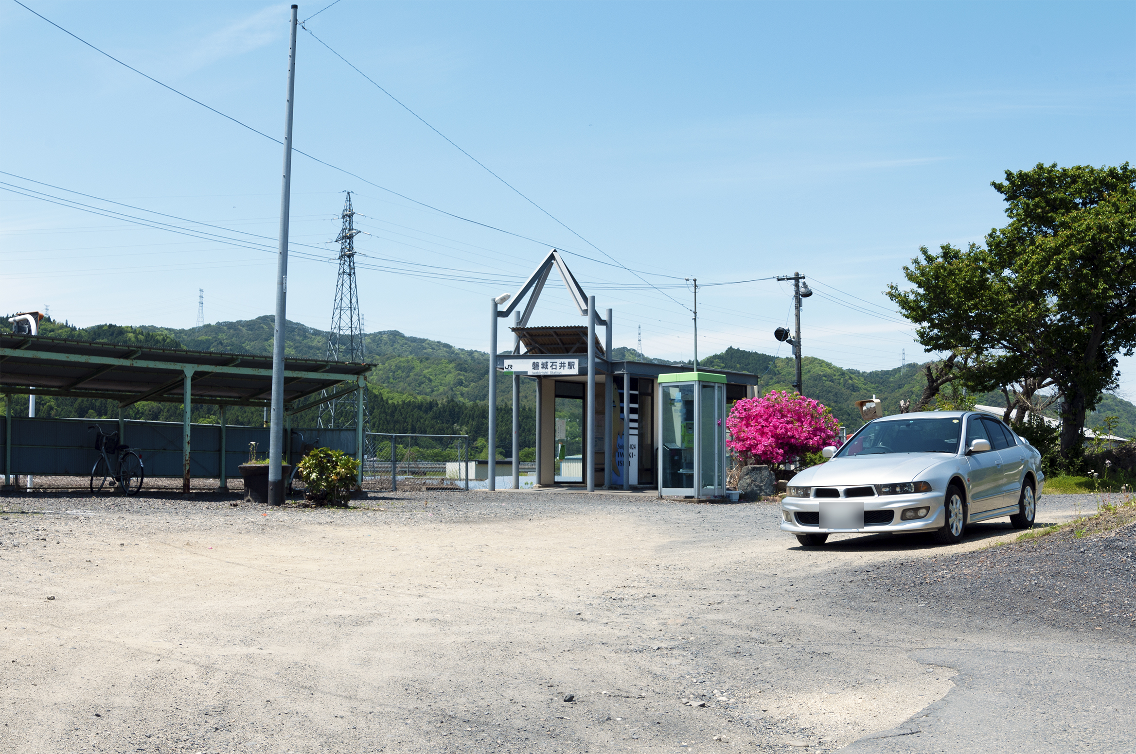 東日本旅客鉄道株式会社水郡線磐城石井駅全景